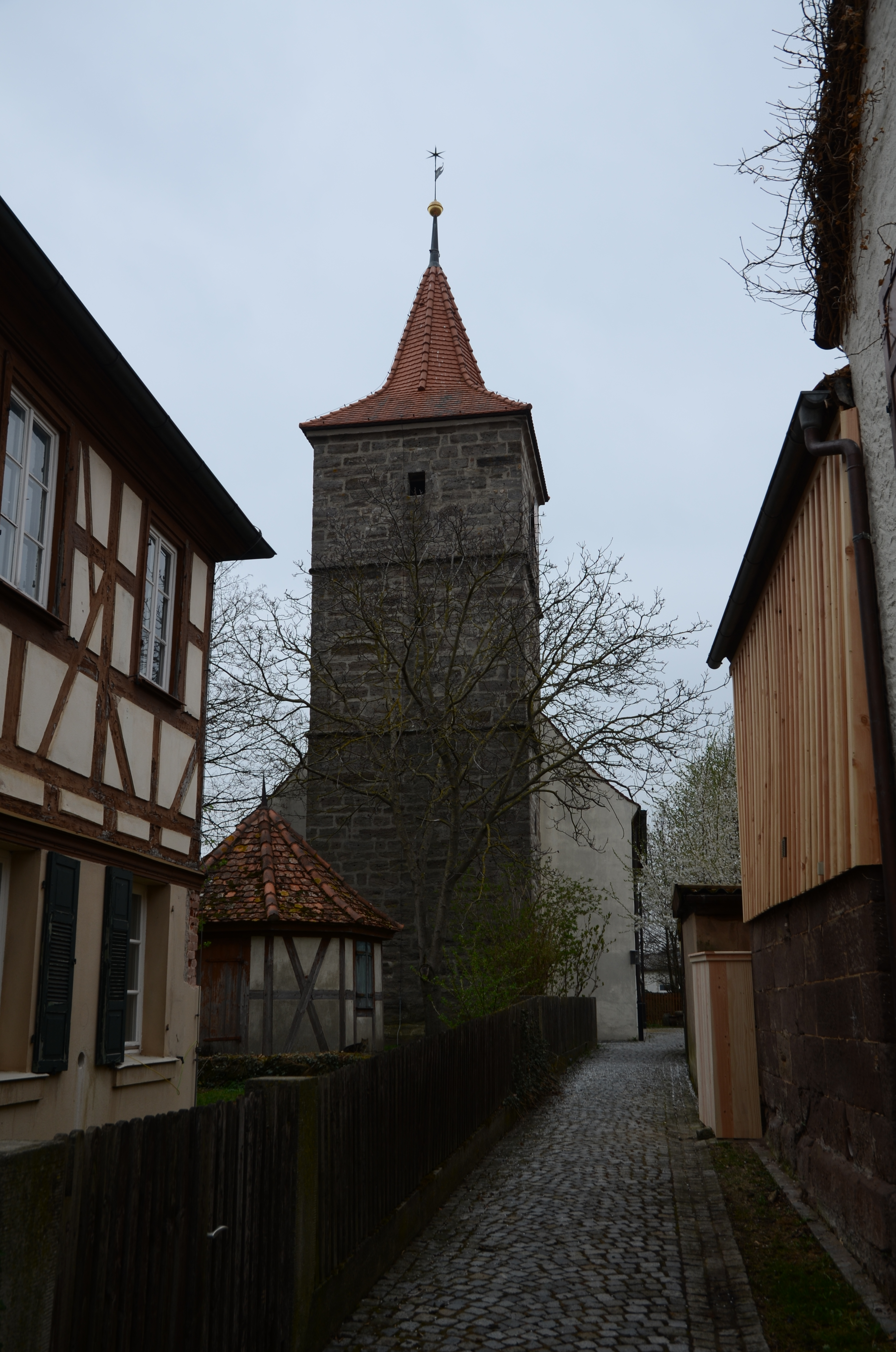 evang.-luth. Kirche St. Kilian in Marktbergel